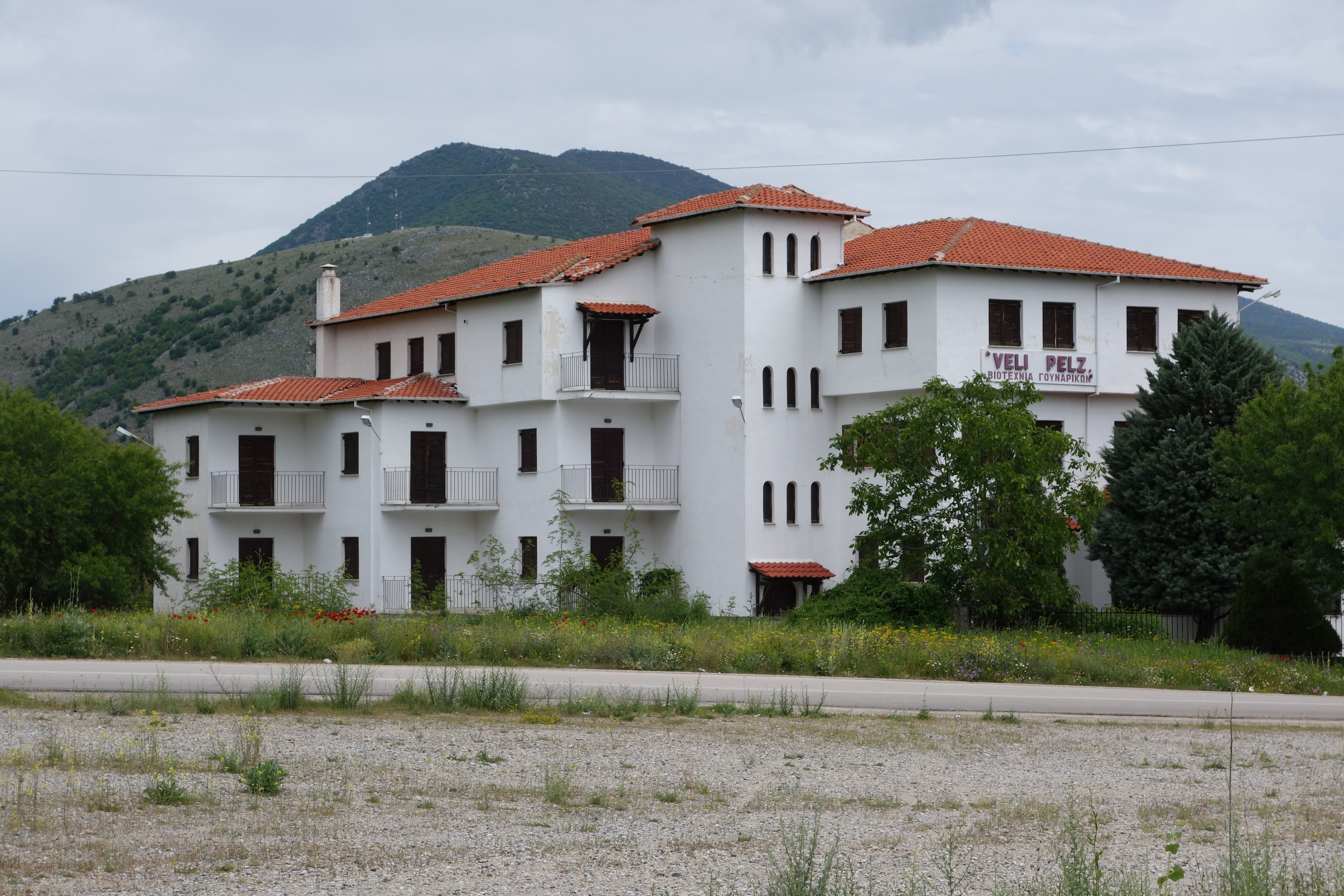 Kürschner in der Stadt Siatista, Griechenland. Veli Pelz. Siehe auch Kürschner in der Präfektur Kastoria und Kürschner in der Stadt Kastoria.